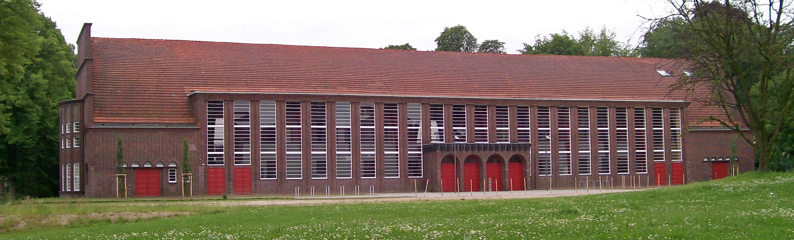 Holstenhorhalle in Lübeck, Schleswig-Holstein, Germany